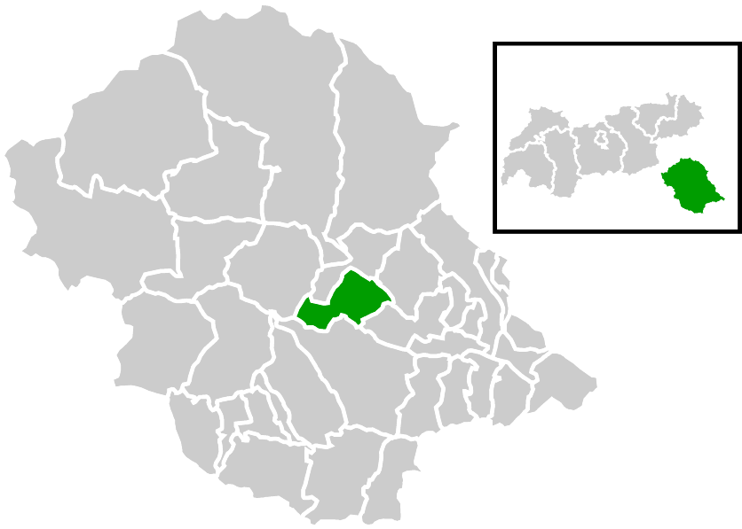 Lage der Gemeinde innerhalb des Bezirks Lienz